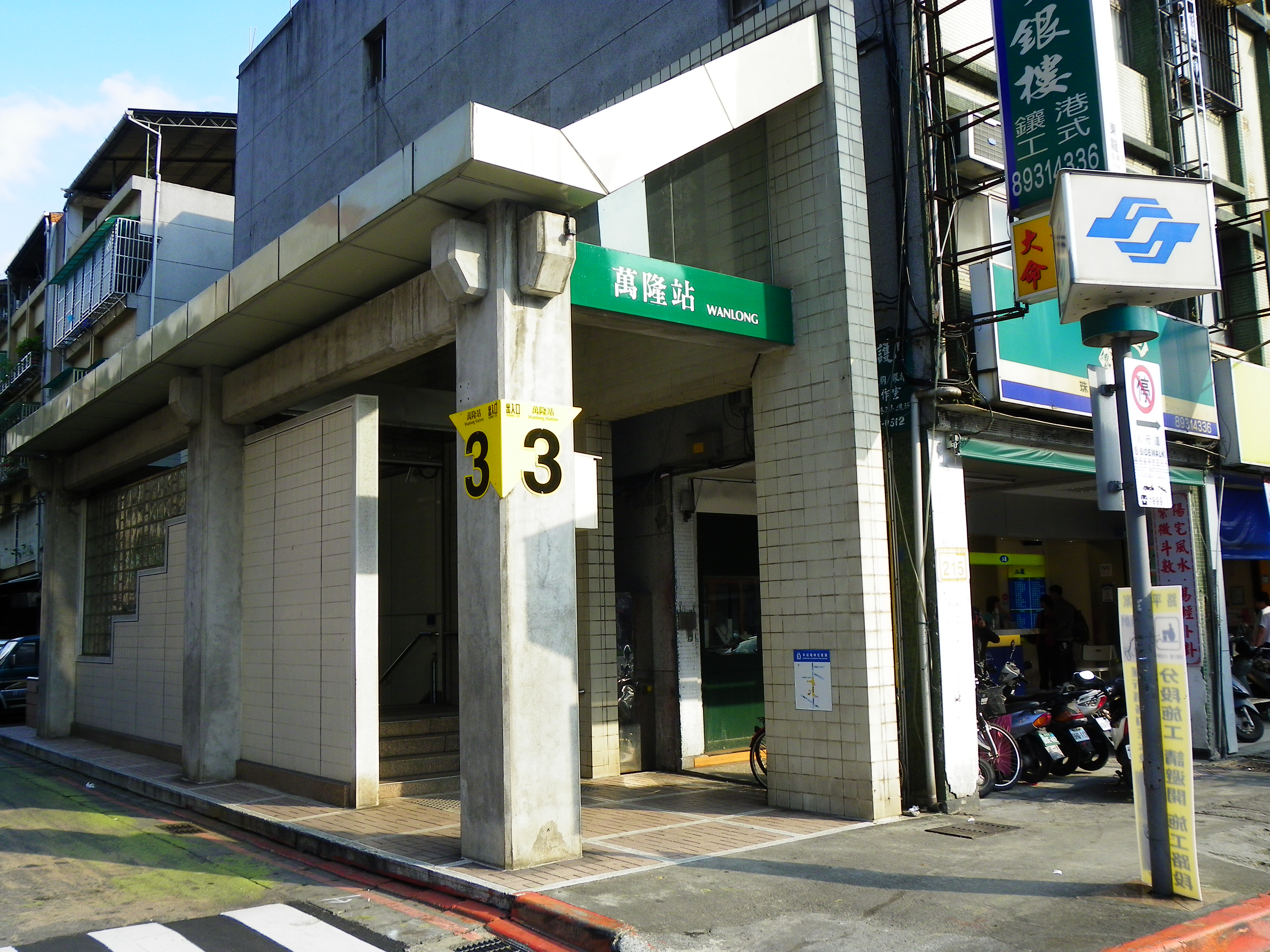 台北捷運新店線万隆駅の3号出口。